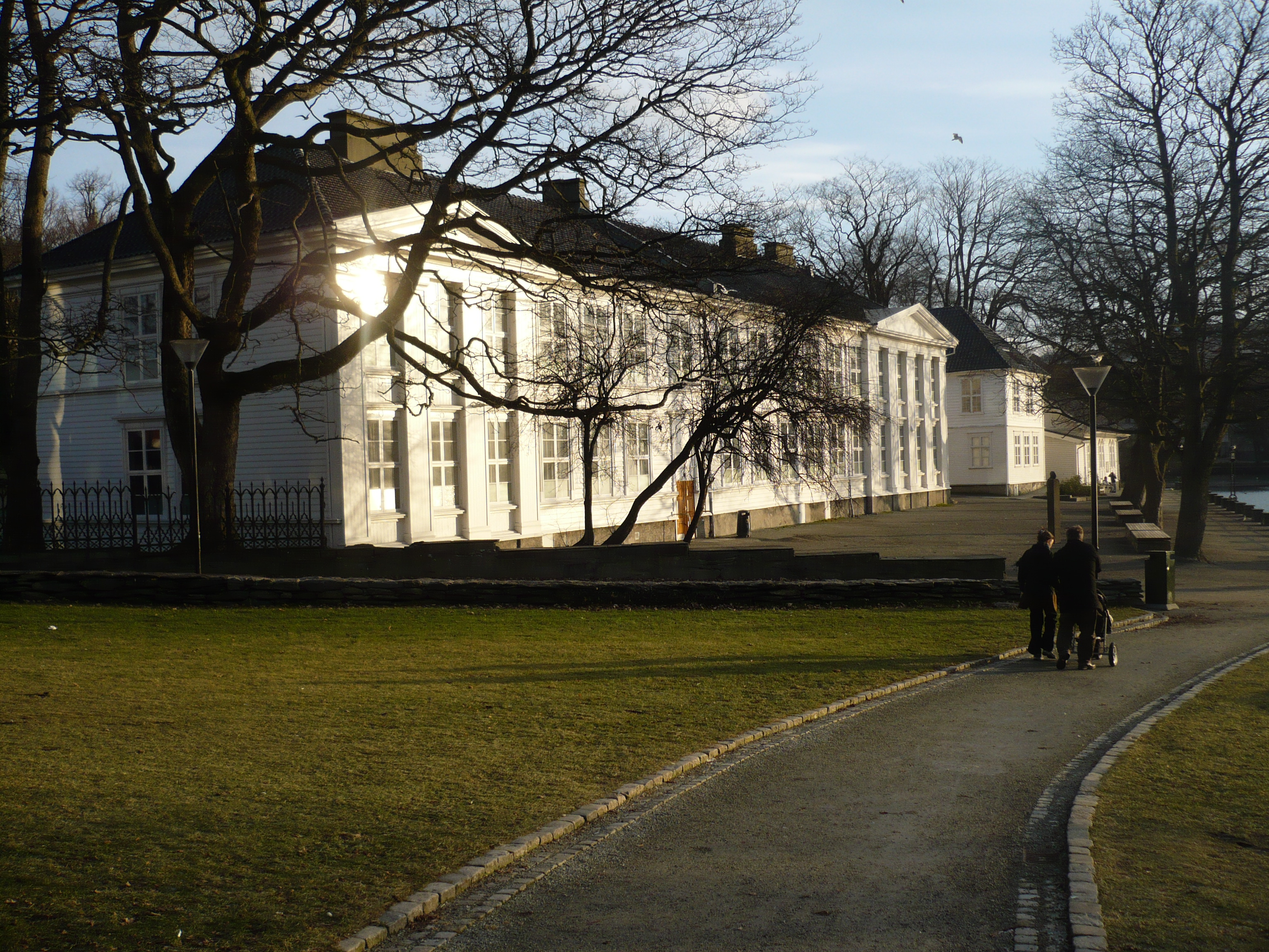 Skolebygningen på Kongsgård i Stavanger